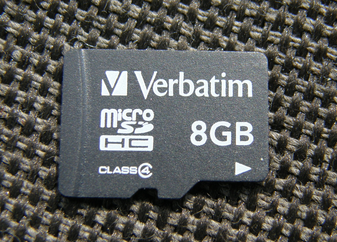 Флеш-память.